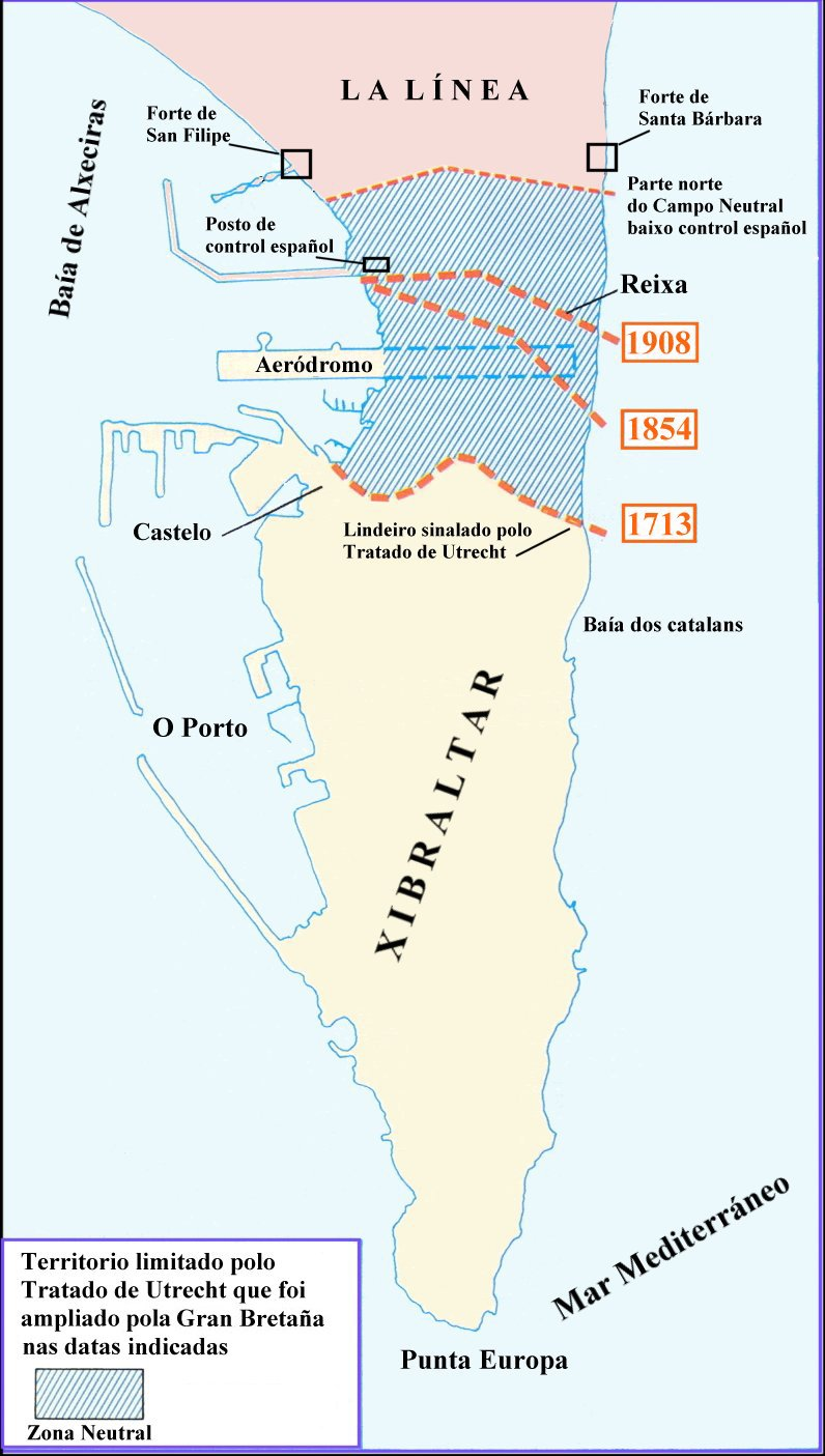 O Campo Neutral de Xibraltar na actualidade, non conforme ao Tratado de Utrecht